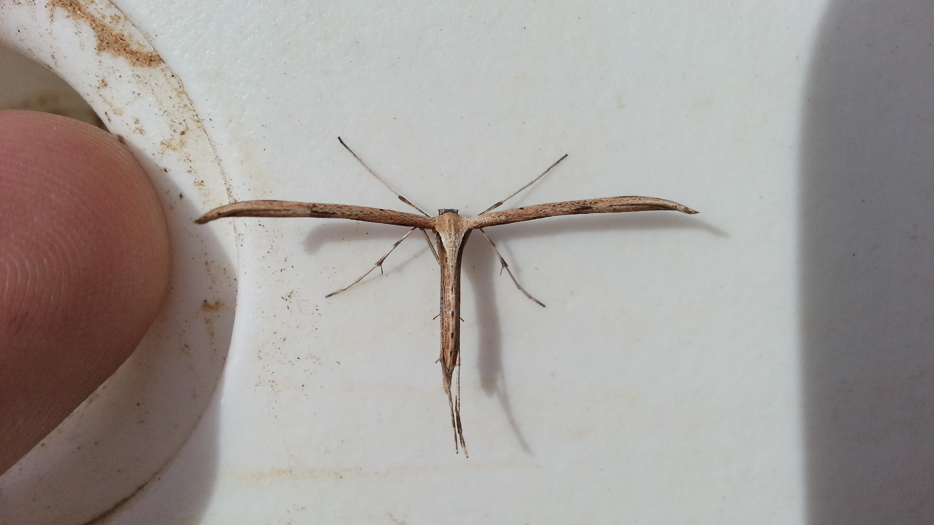 Federmotte im Grössenvergleich (Fingerkuppe links)